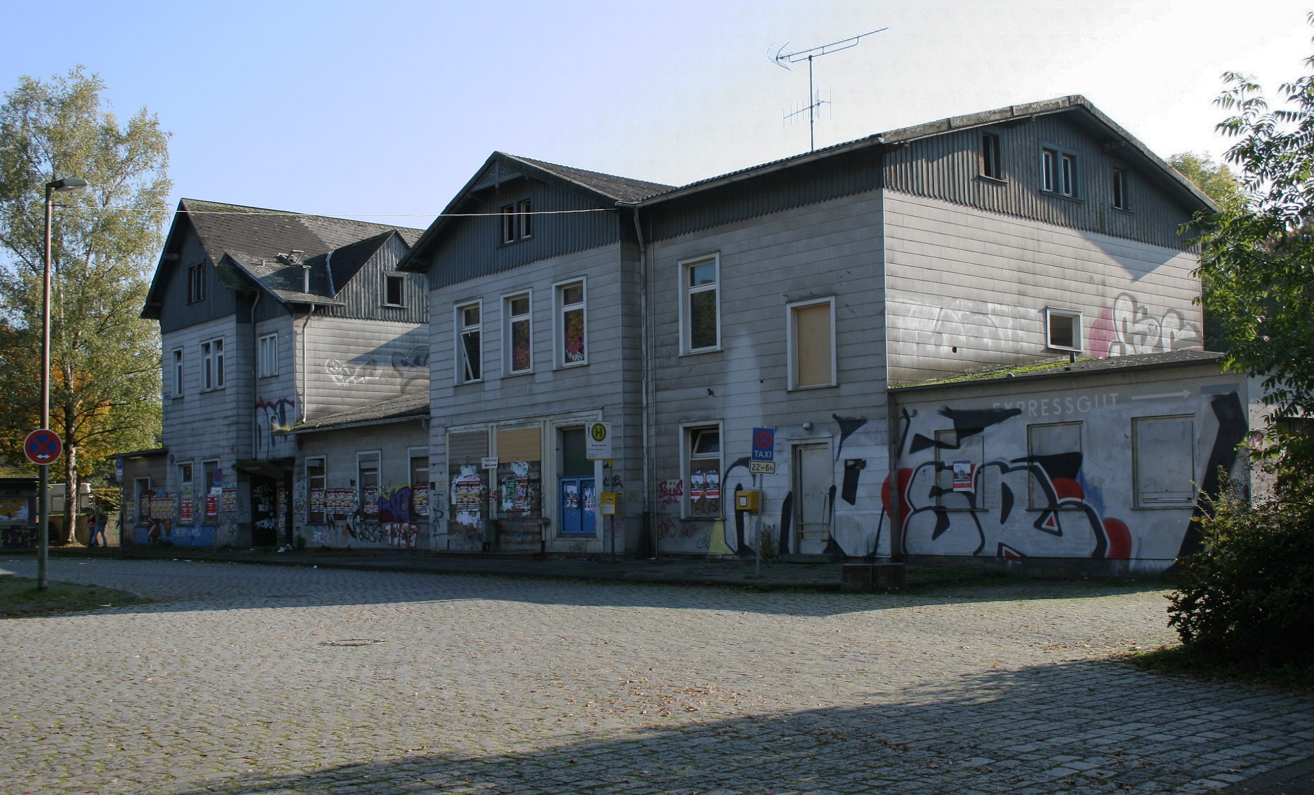 Bahnhof Menden der Hönnetalbahn in Menden. Bahnhofsgebäude wurden im Mai 2012 agerissen.